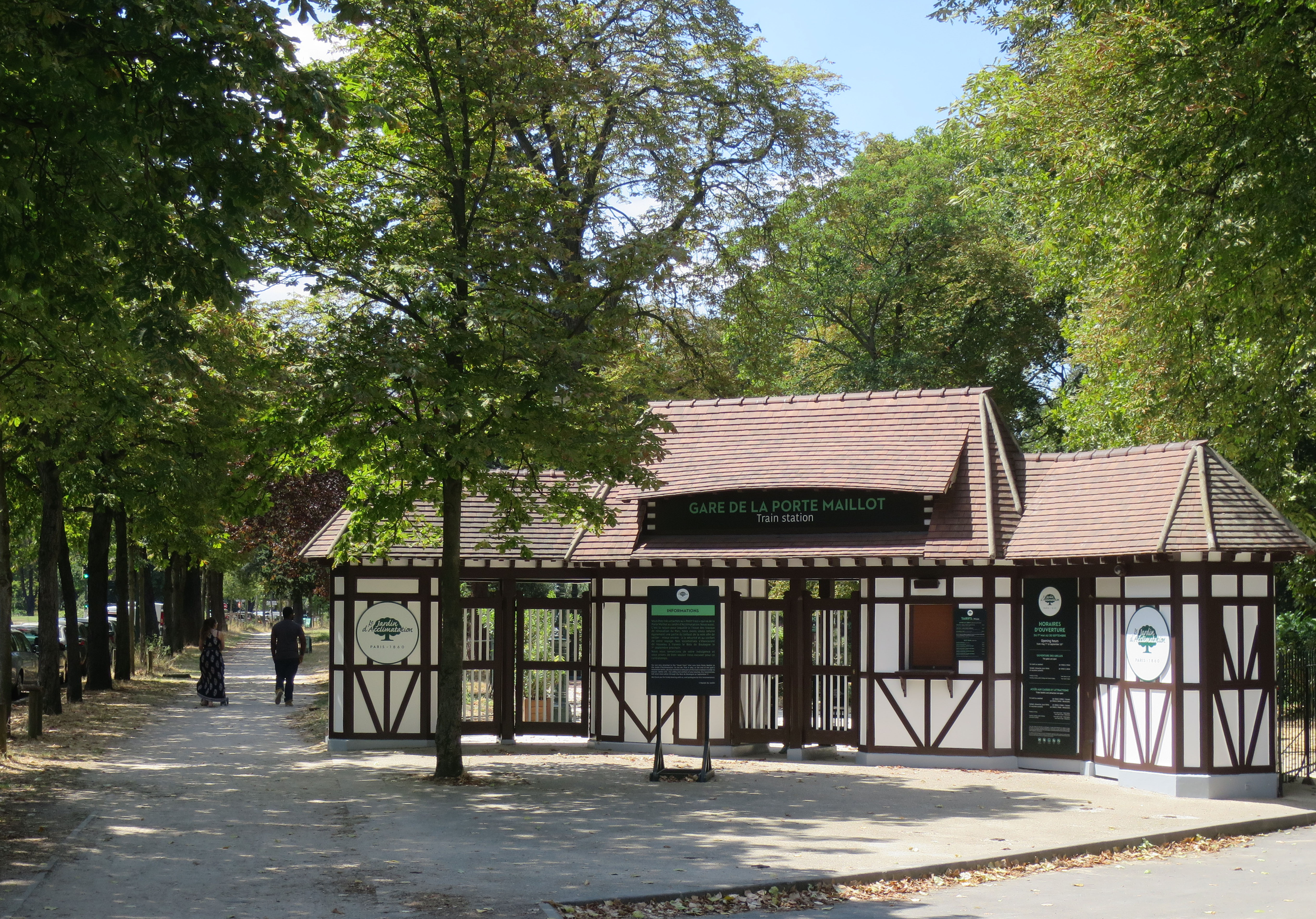 Empfangsgebäude des Haltepunkts La Porte Maillot